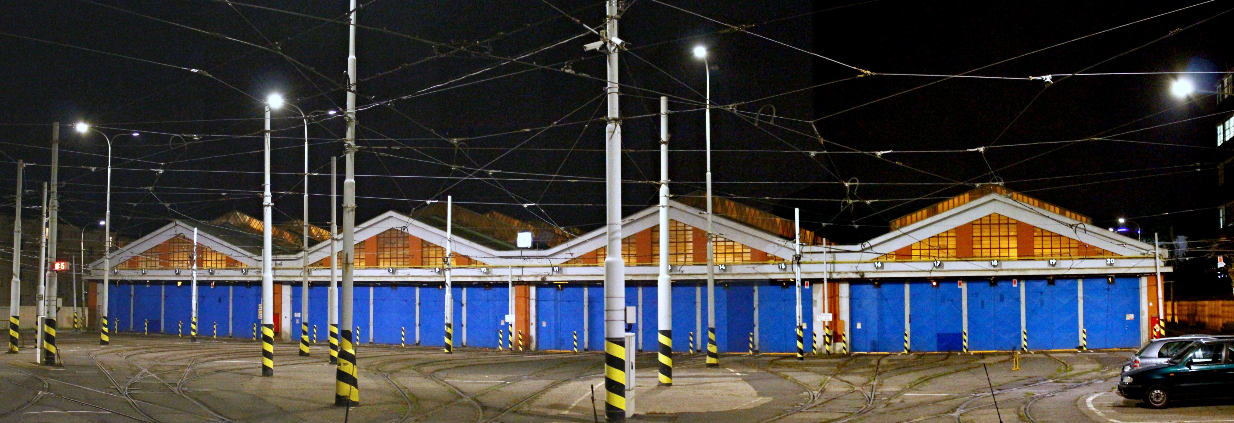 Vozovna Strašnice